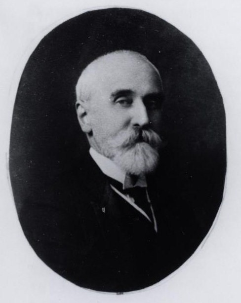 Барон Па́вел Па́влович Корф (1845 — 1935)